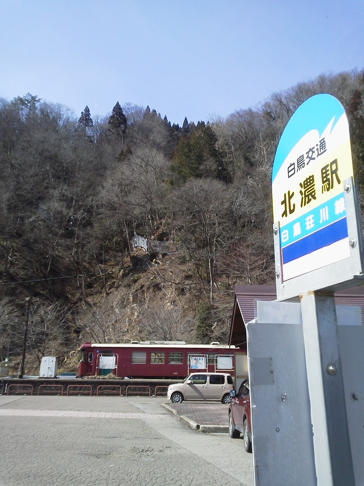 hokuno_bus